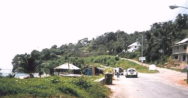 Rose Hill an der Ostküste von Jamaika Aufnahme: Juni 1999 Url